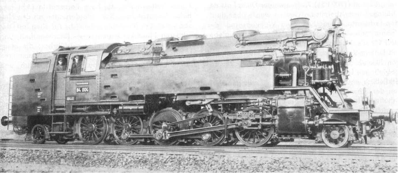 Betriebsfoto der 84 004 auf einer historischen Aufnahme